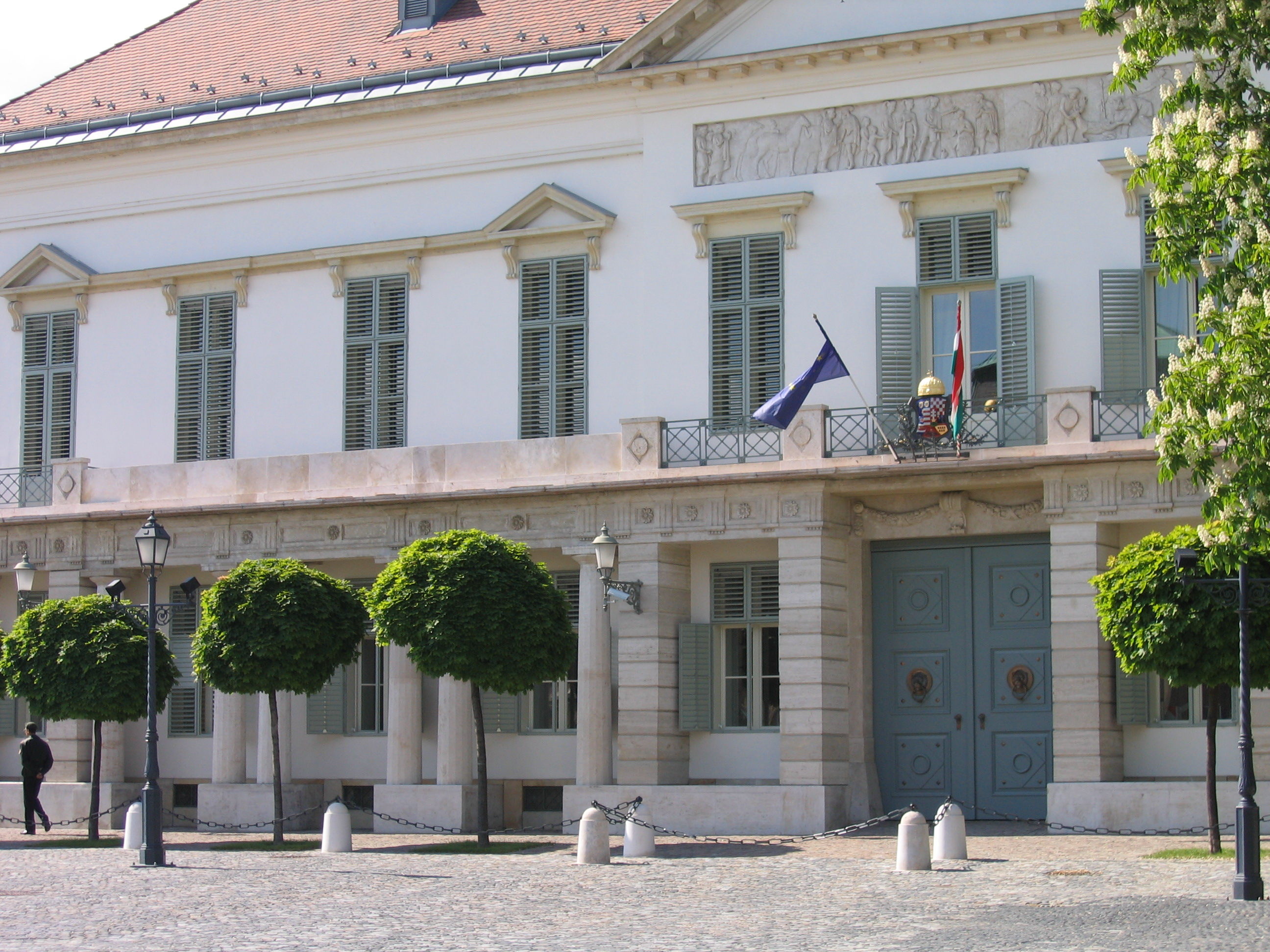 Buda Castle (Budai Vár) Budapest, Hungary